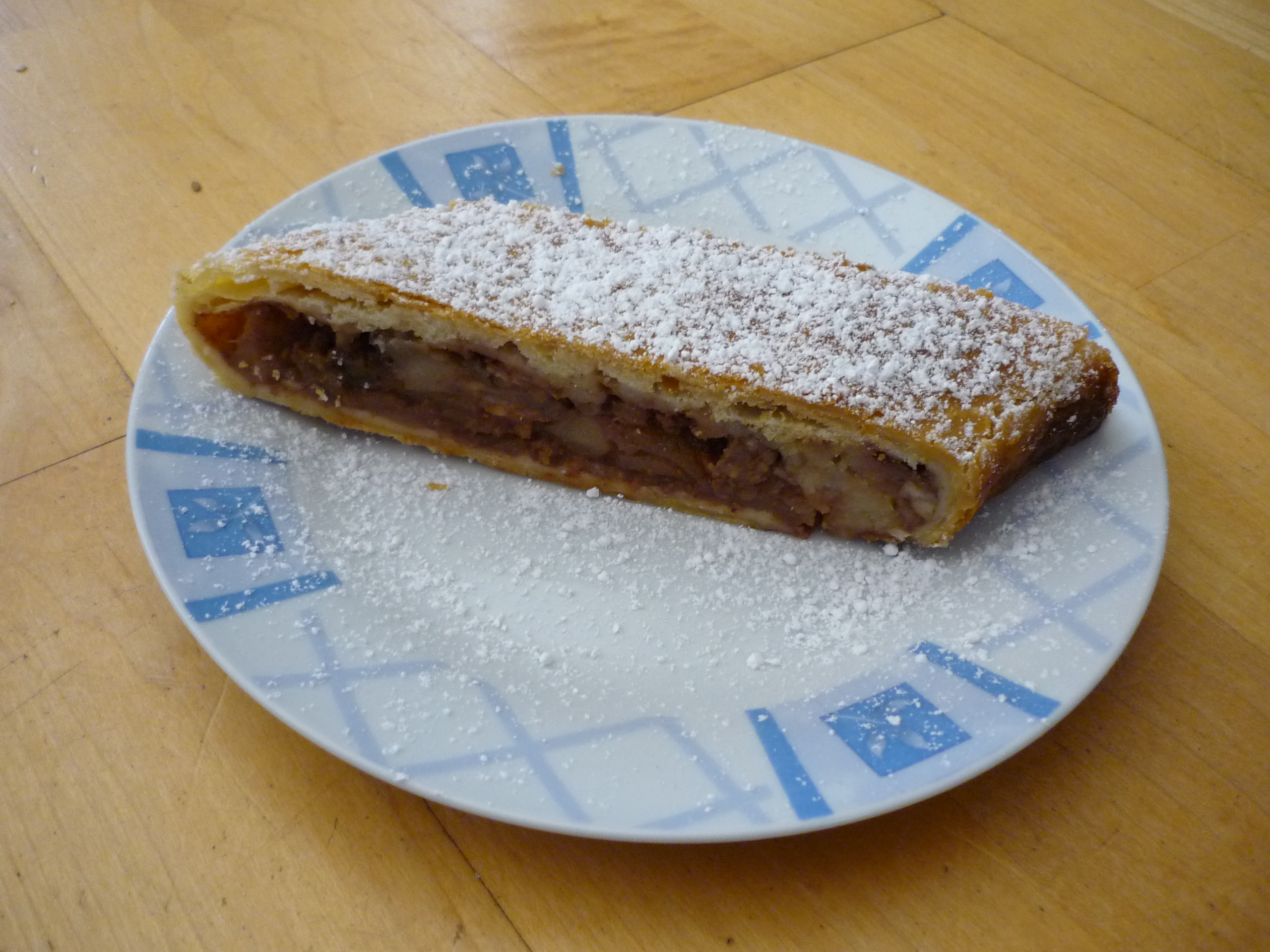 Ein Apfelstrudel österreichischer Herkunft.